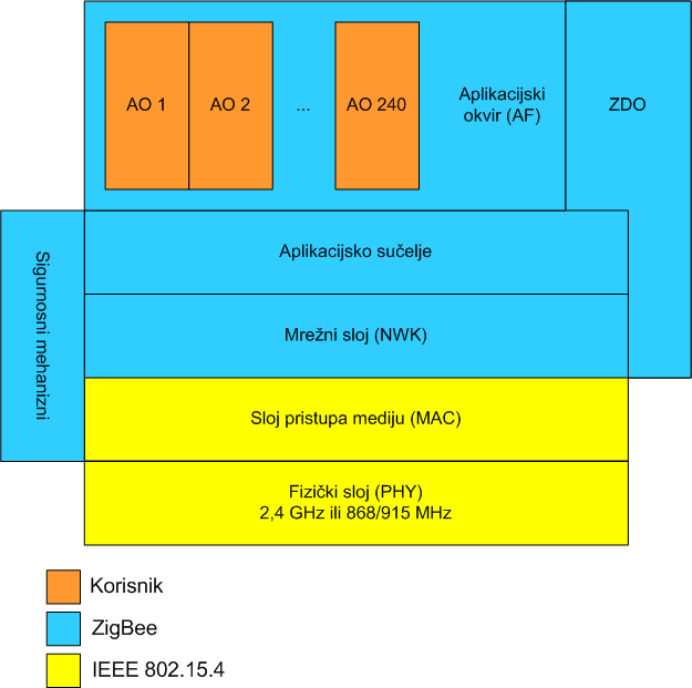 ZigBee protokolni stog